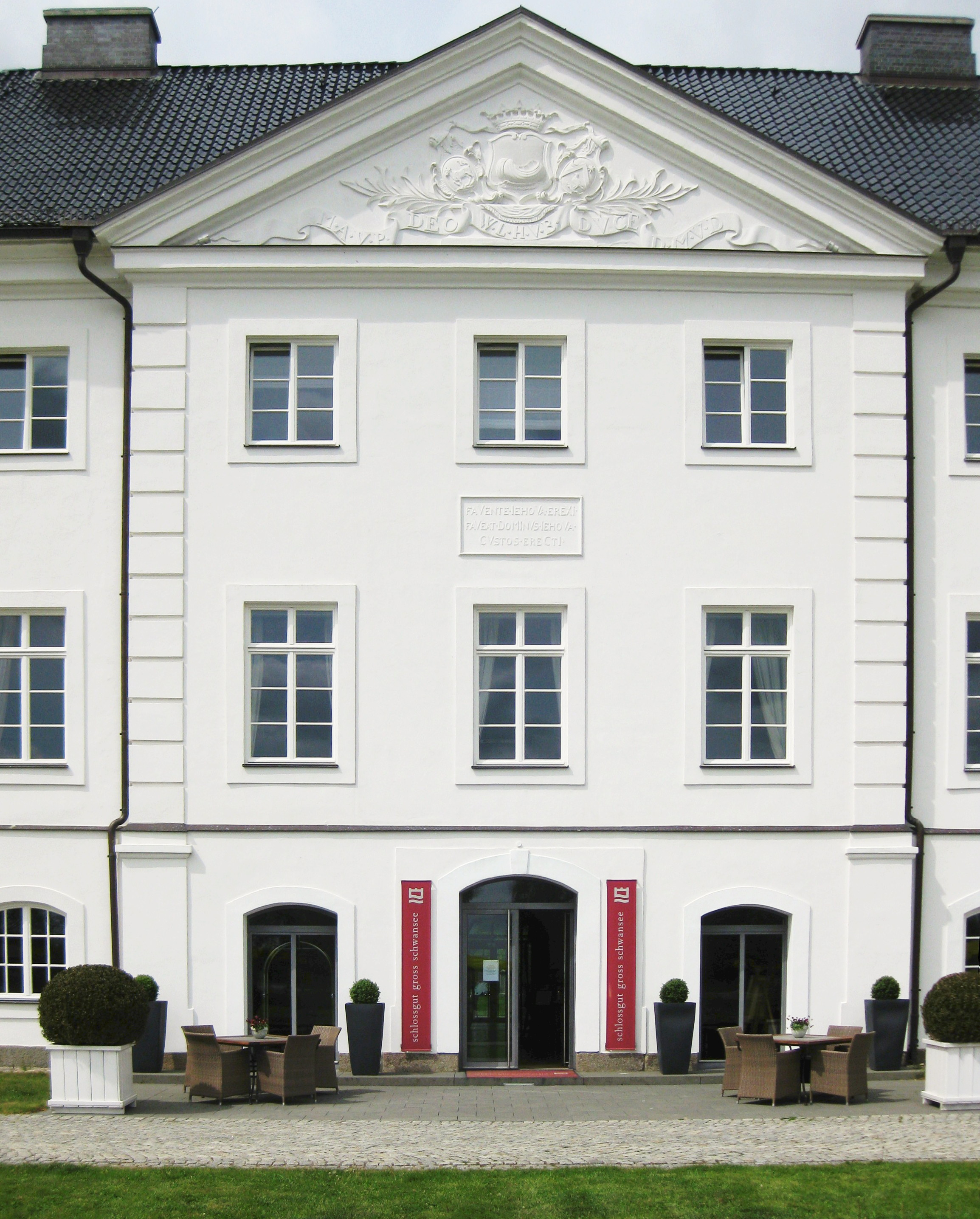 Herrenhaus Gr. Schwansee Mittelrisalit Hofseite.